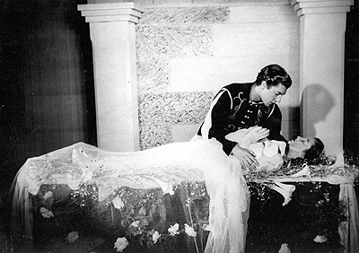 Atores Paulo Porto e Sônia Oitica como Romeu e Julieta.